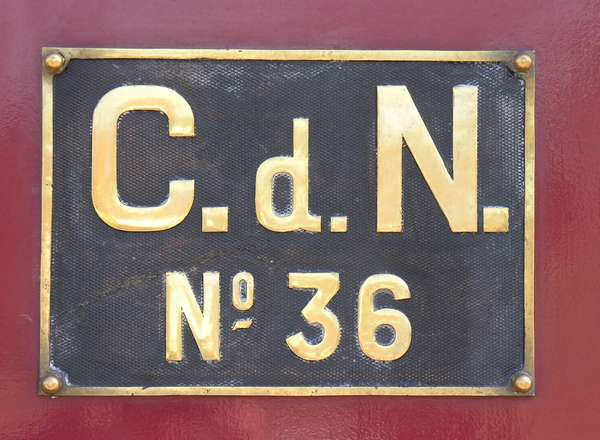 Plaque de la locomotive Corpet-Louvet ex-Chemins de Fer des Côtes-du-Nord n°36